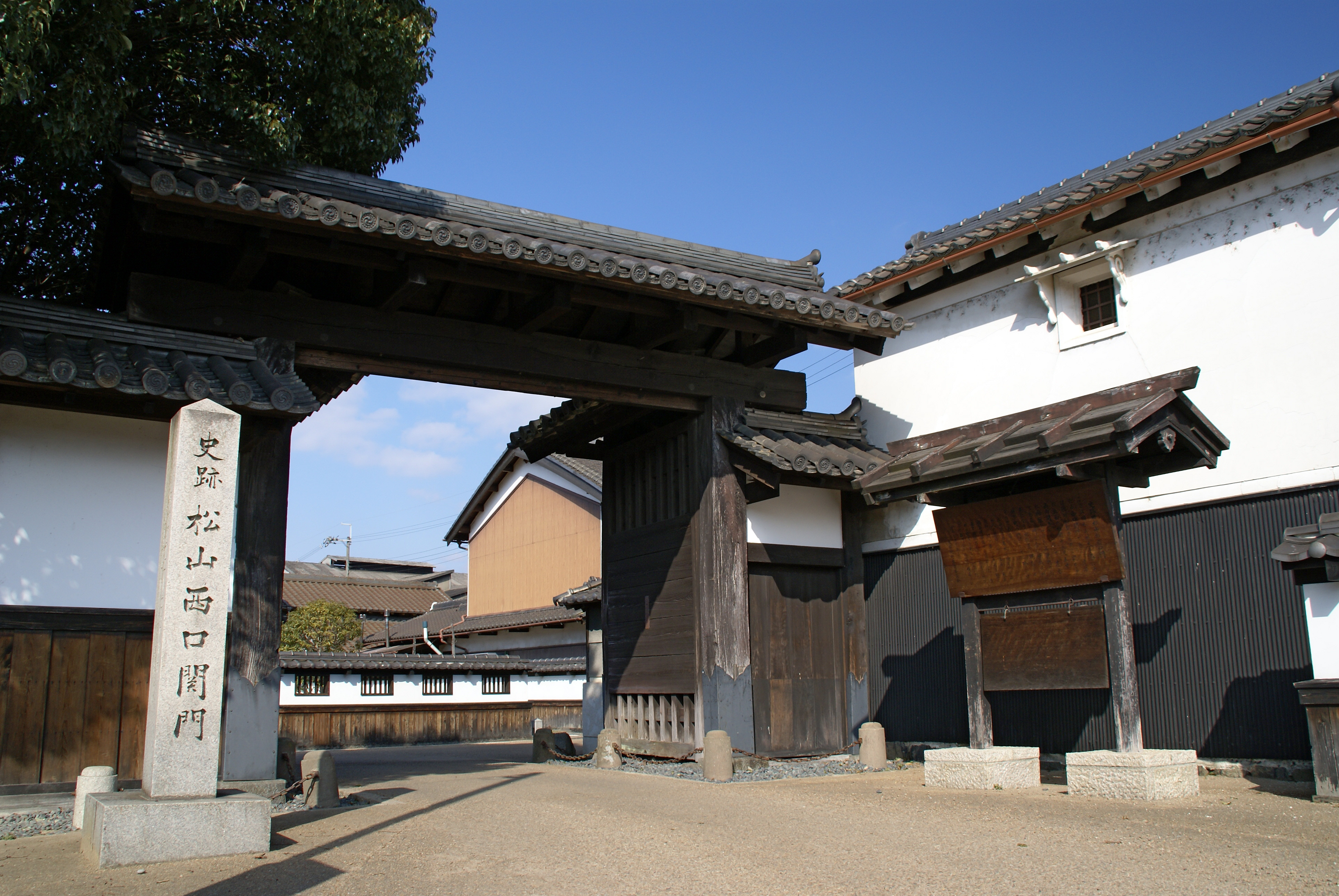 Matsuyama in Uda, Nara prefecture, Japan